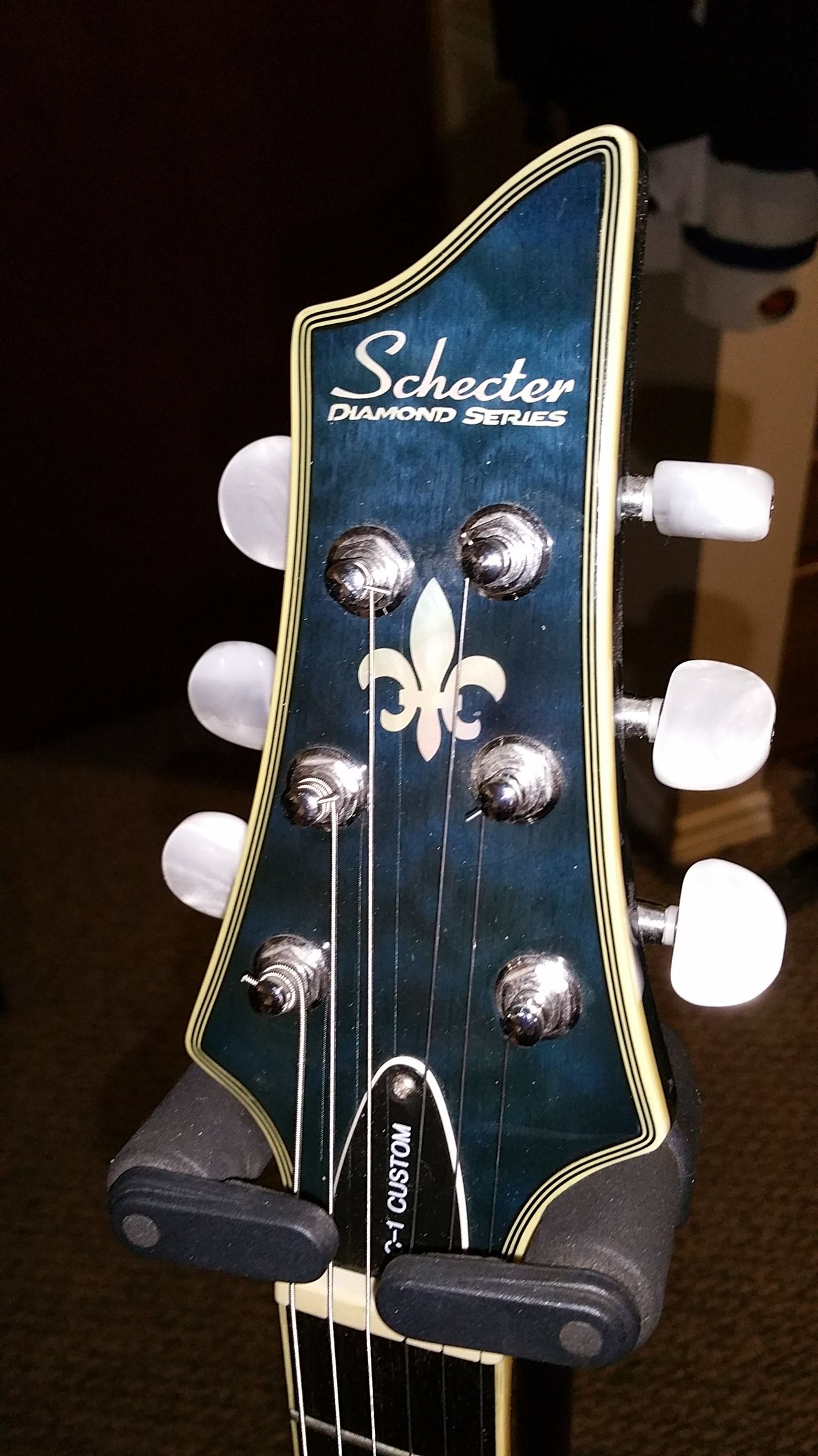 גיטרה של חברת שכטר.